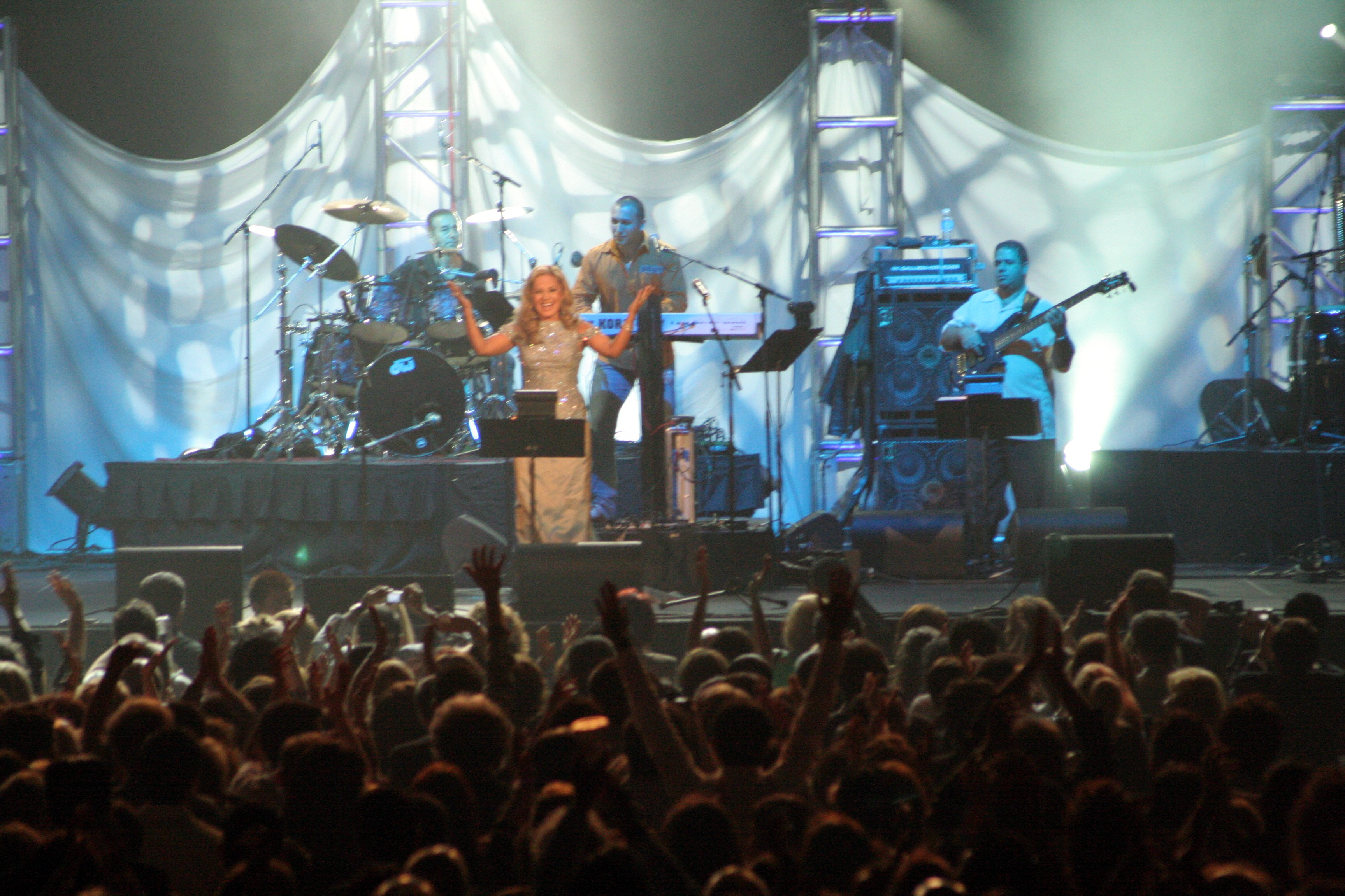 Toronto -Air canada center